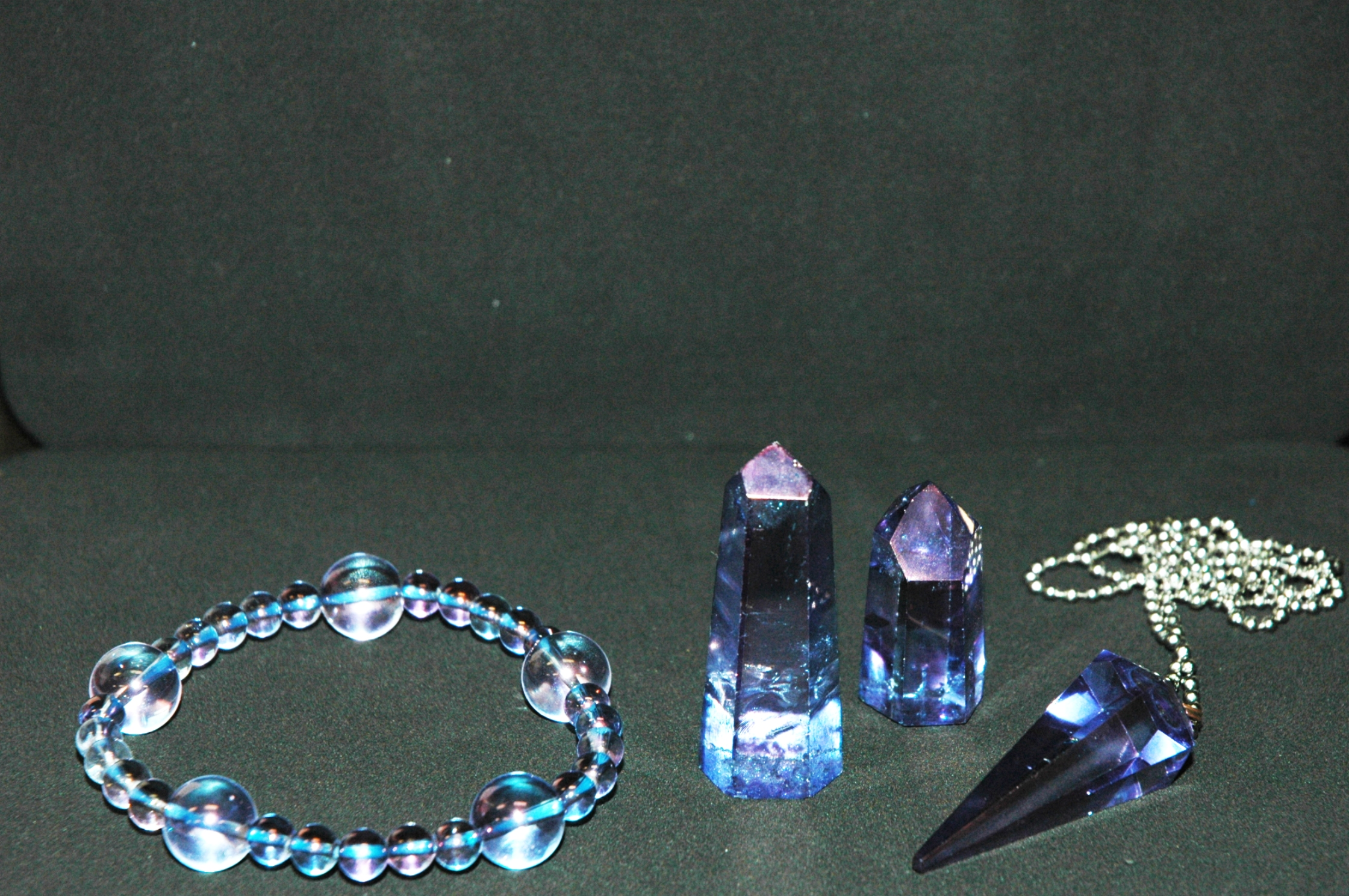 コスモオーラクリスタル写真